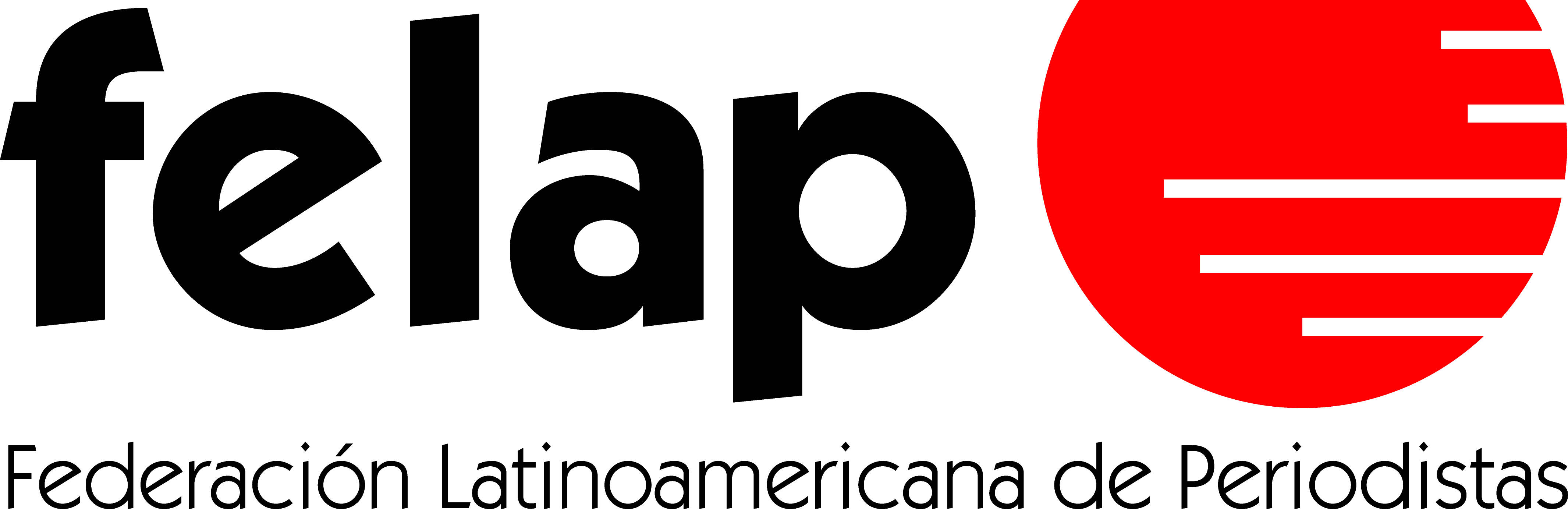 Logotipo oficial de la Federación Latinoamericana de Periodistas desde 1976.